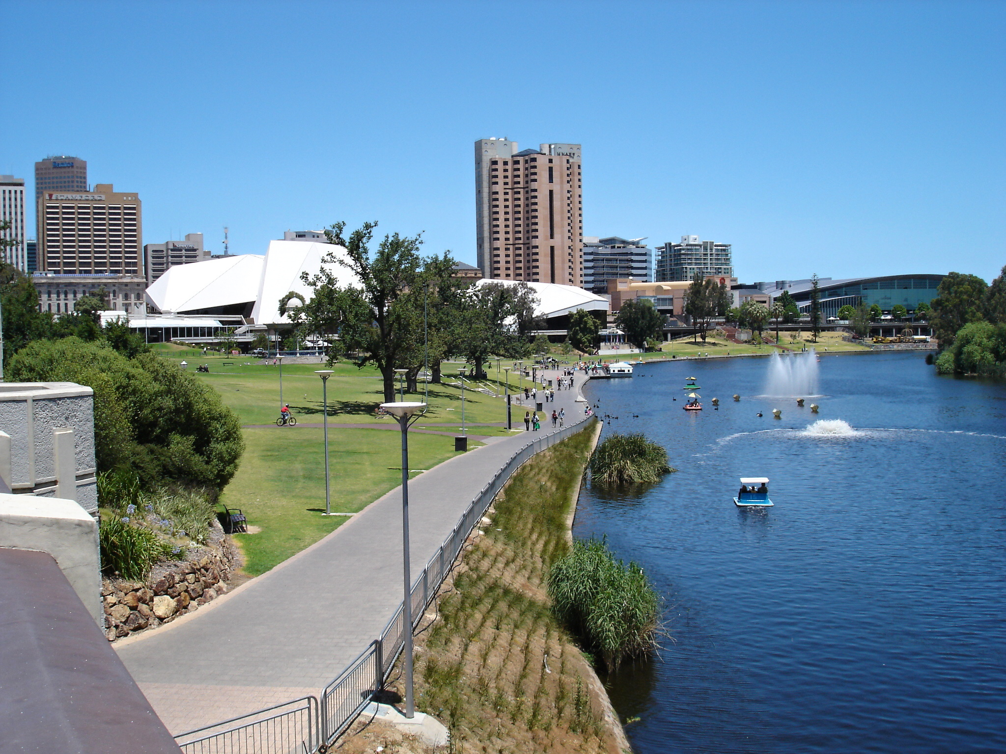 Adelaide - Torrens River